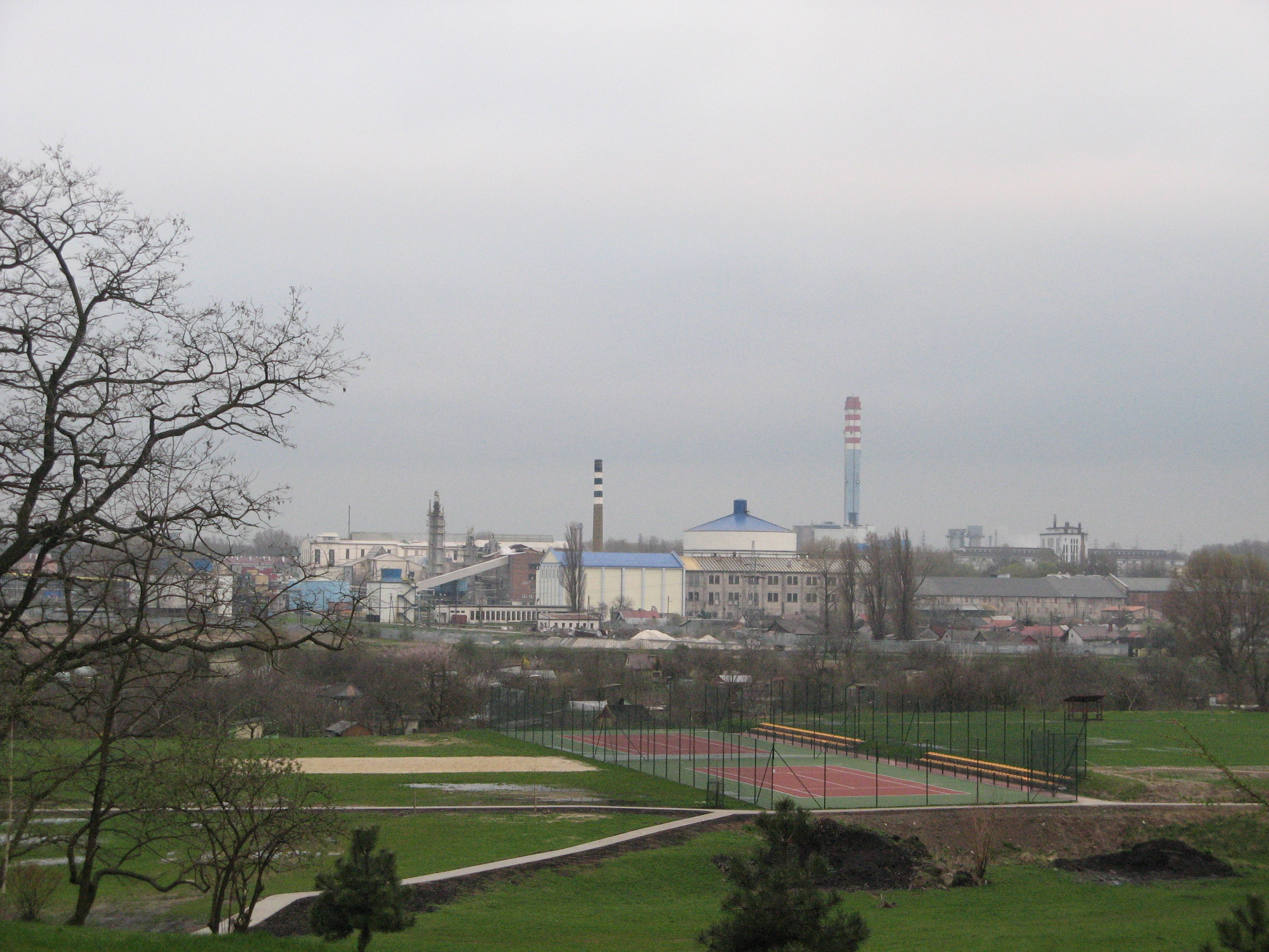 Korty tenisowe przy Politechnice Lubelskiej. Na drugim planie nie istniejąca obecnie Cukrownia Lublin i osiedle Za Cukrownią, dalej komin elektrociepłowni Lublin-Wrotków. Na terenach po dawnej cukrowni, pomiędzy rzeką Bystrzycą, a budynkami wciąż należącymi do Krajowej Spółki Cukrowej, w latach 2011-2013 powstać ma nowy Stadion Miejski o charakterze piłkarskim.